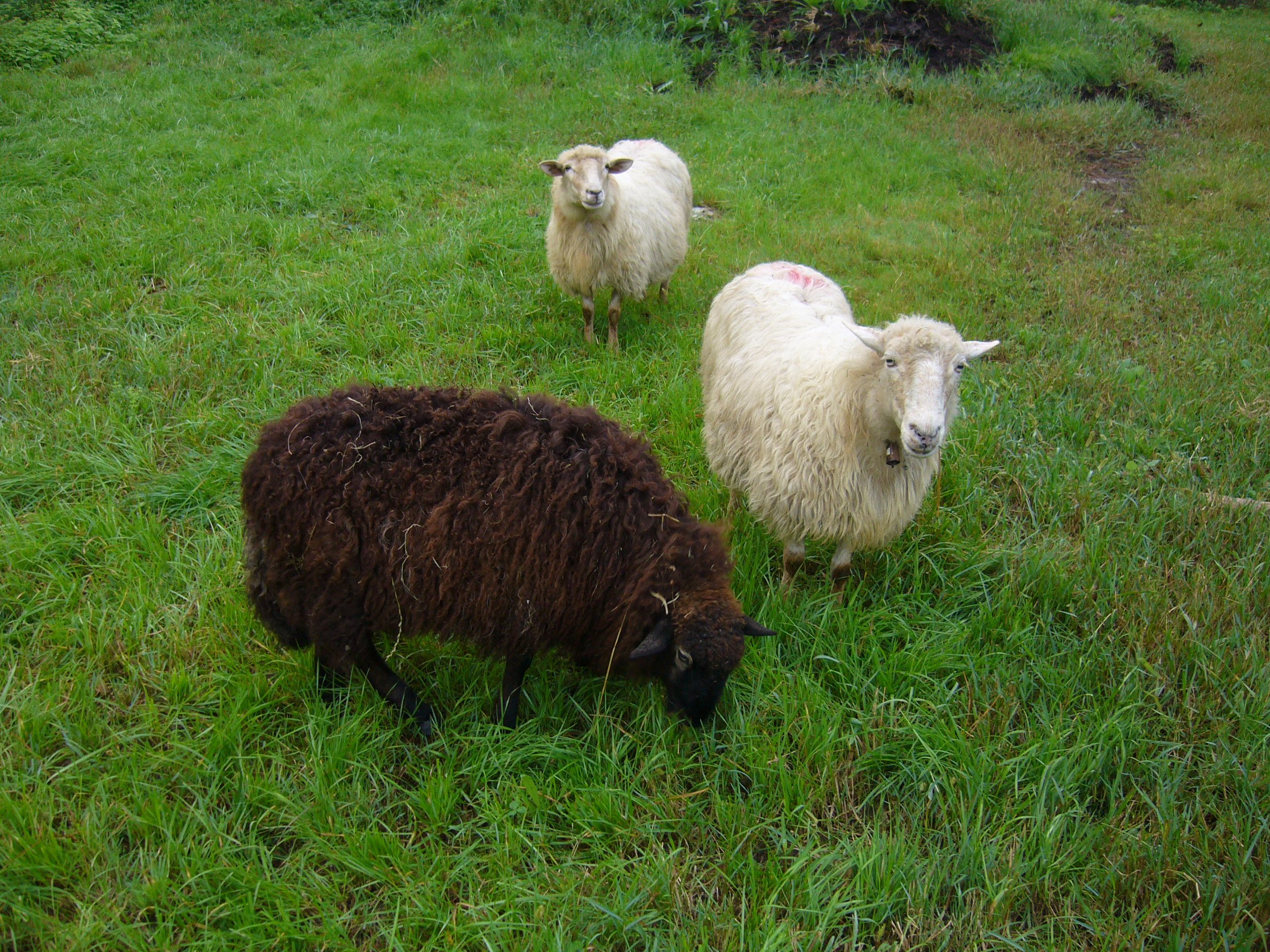 Pirinioetan Martak izeneko ardiak kolore beltza duten ardiak dira. argazkian ardi latxak×